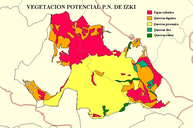 Distribución de la vegetación potencial de las masas forestales en el Parque Natural de Izki. Modificado de Sistema Cartográfico Ambiental de la Comunidad Autónoma del País Vasco. Gobierno Vasco. Soporte informático GESPLAN